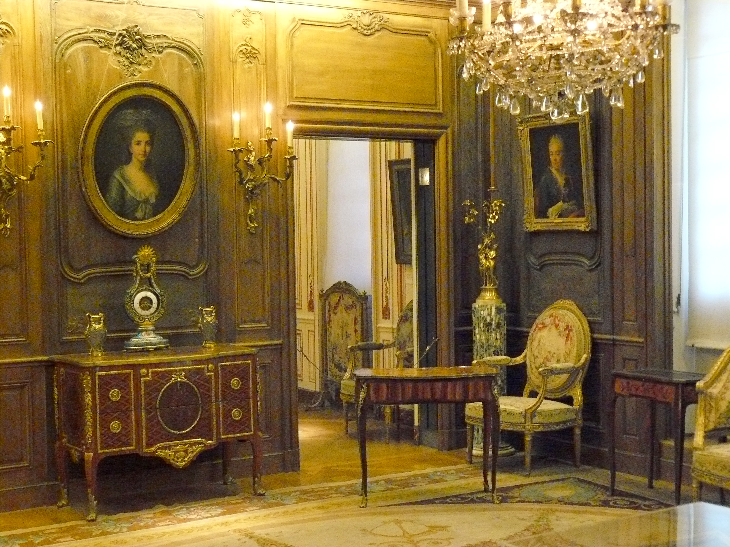 Musée Cogancq-Jay (Hôtel de Donon, IIIe arrond de Paris), reconstitution d'un intérieur du XVIIIe siècle.